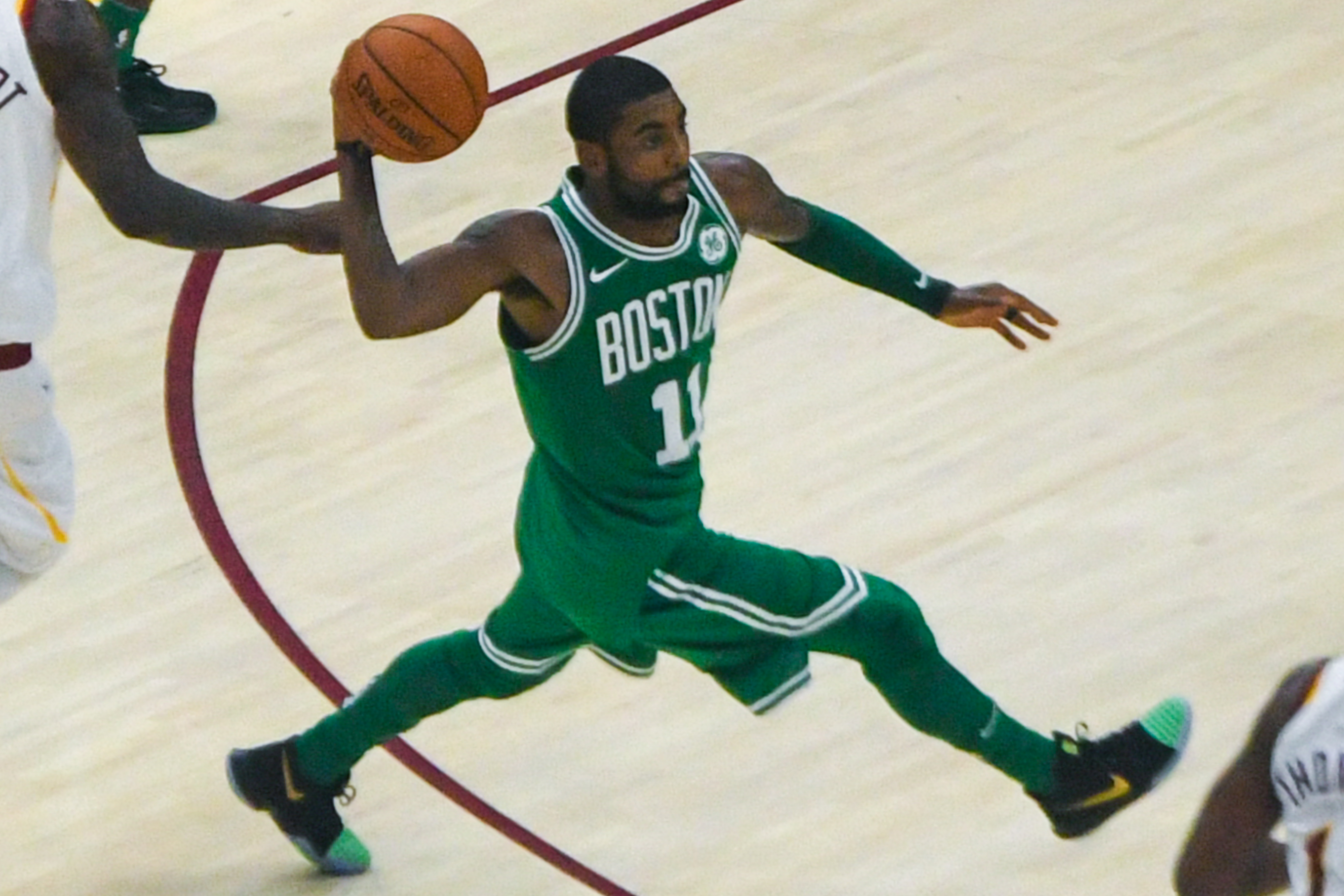 Kyrie Irving